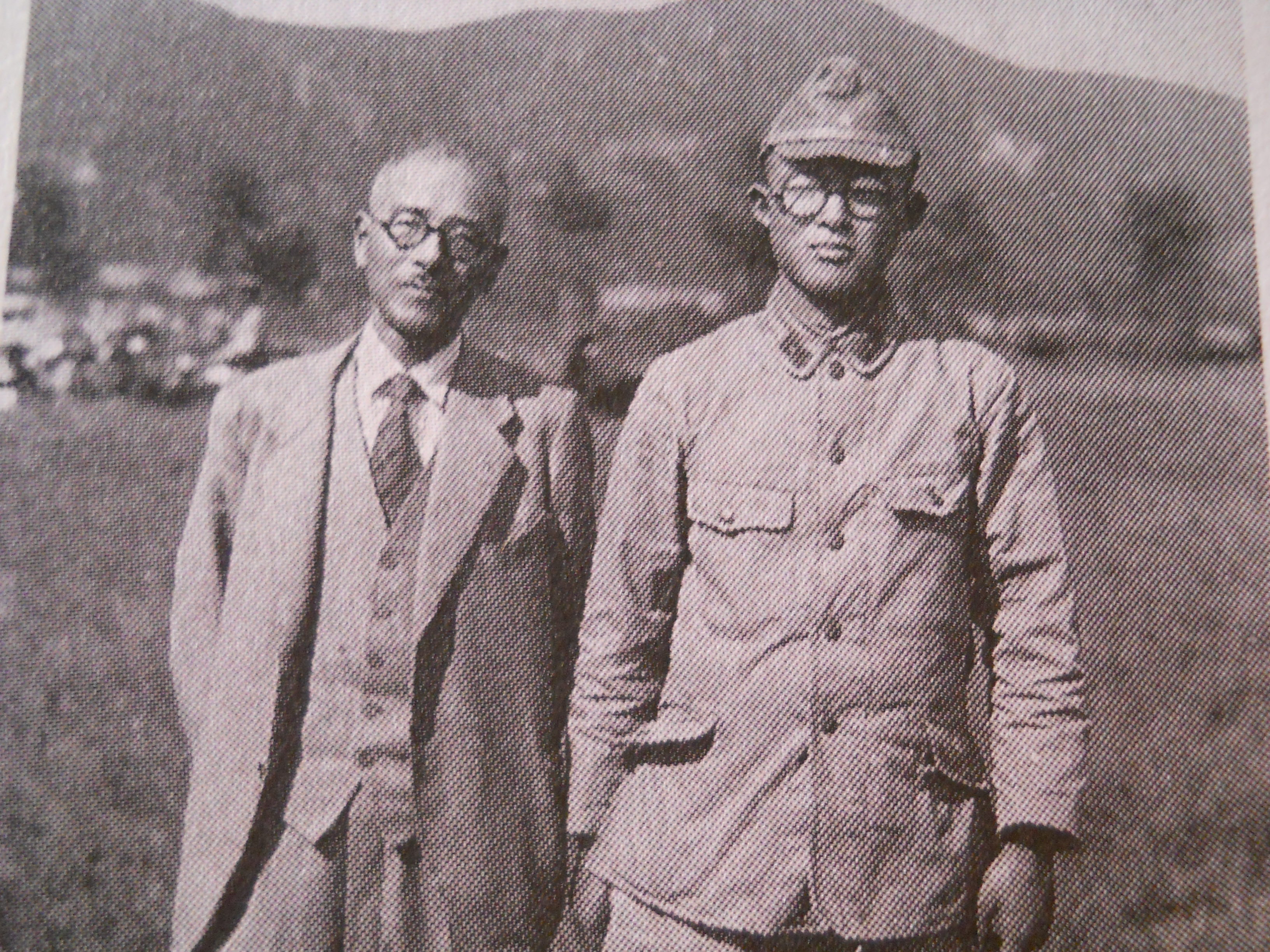 ＭｉｚｕｋｉＳｈｉｇｅｒｕ and Ｆａｔｈｅｒ